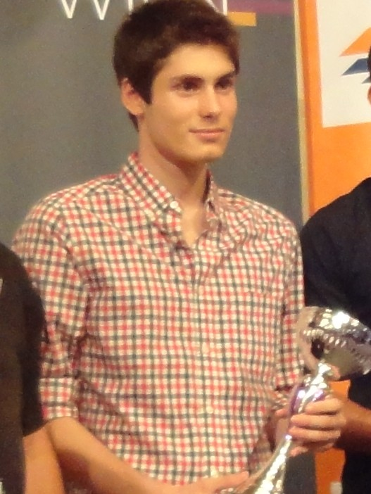 Francesco Rambaldi, Sieger des Vienna Chess Open 2015 in Wien.